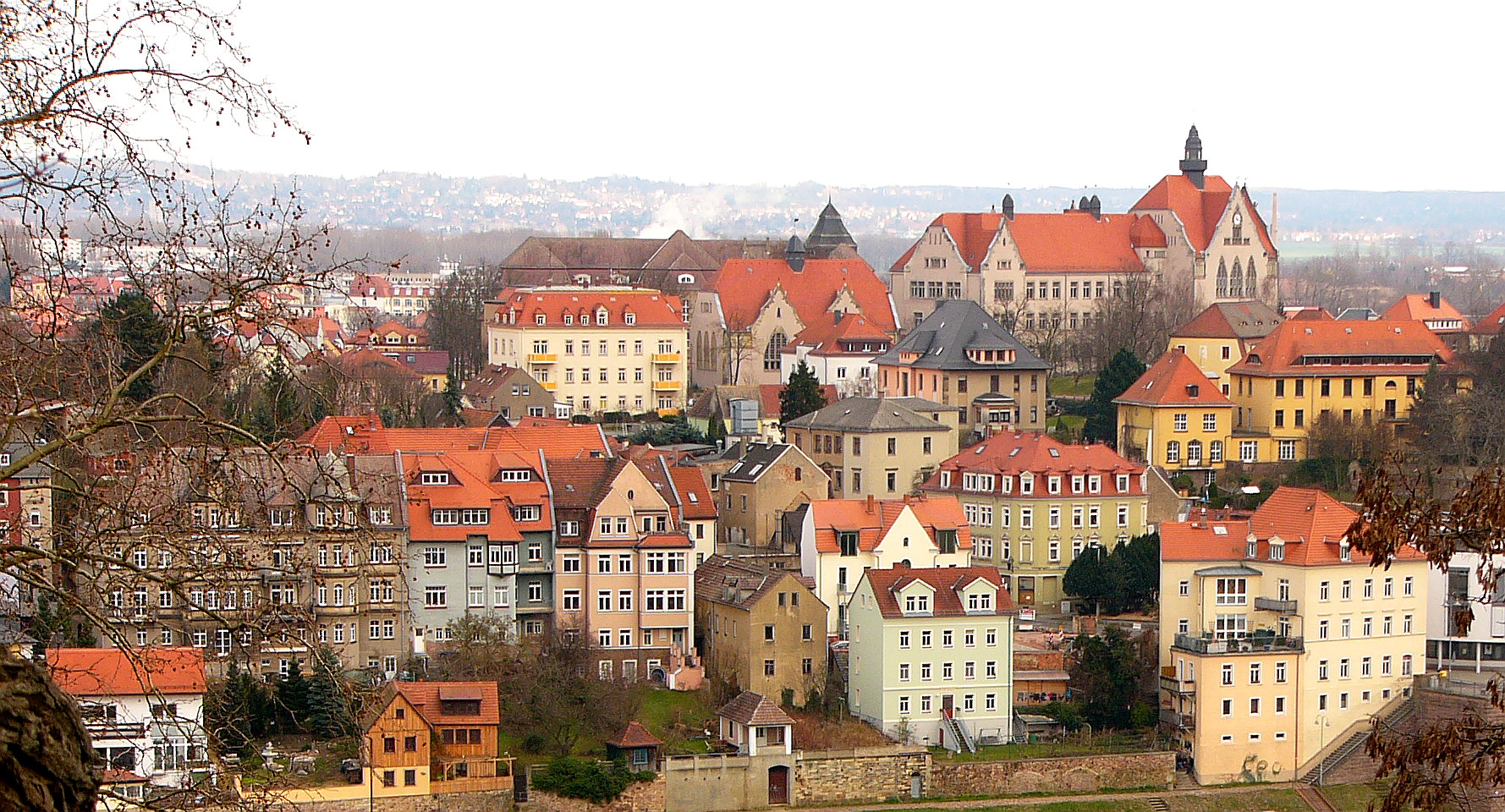 Gymnasium Franziskaneum - hoch über dem Meißener Stadtteil Niederfähre-Vorbrücke.